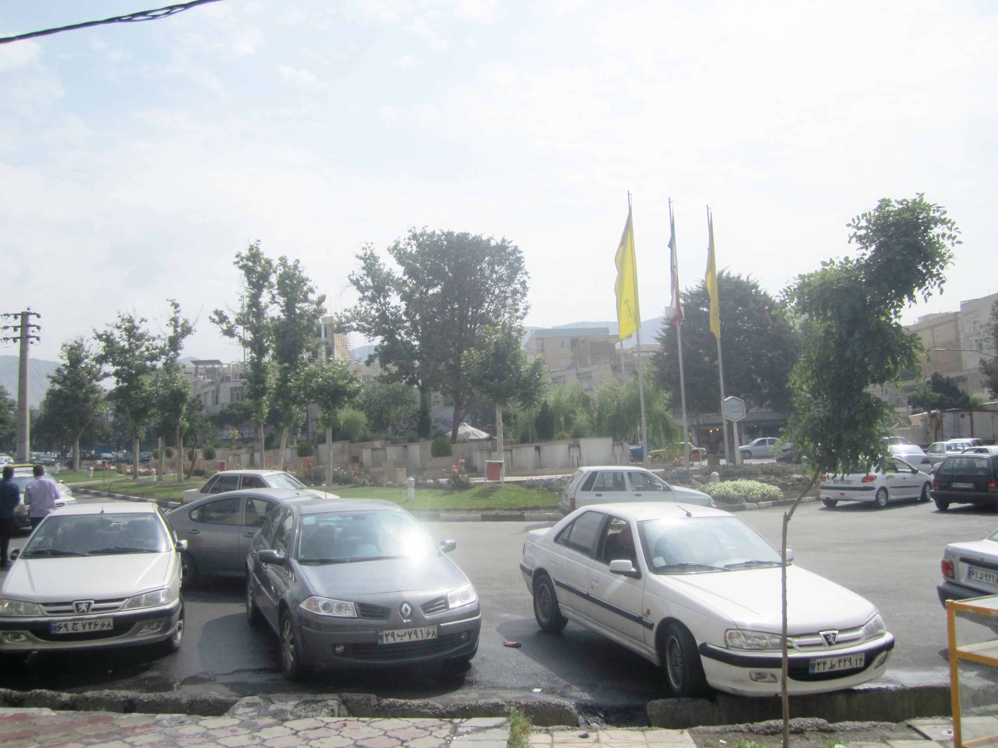 نمایی از میدان رستاخیز، گوهردشت، کرج